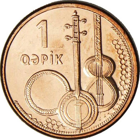 1 Azərbaycan qəpiyi, 2006 - üz tərəf